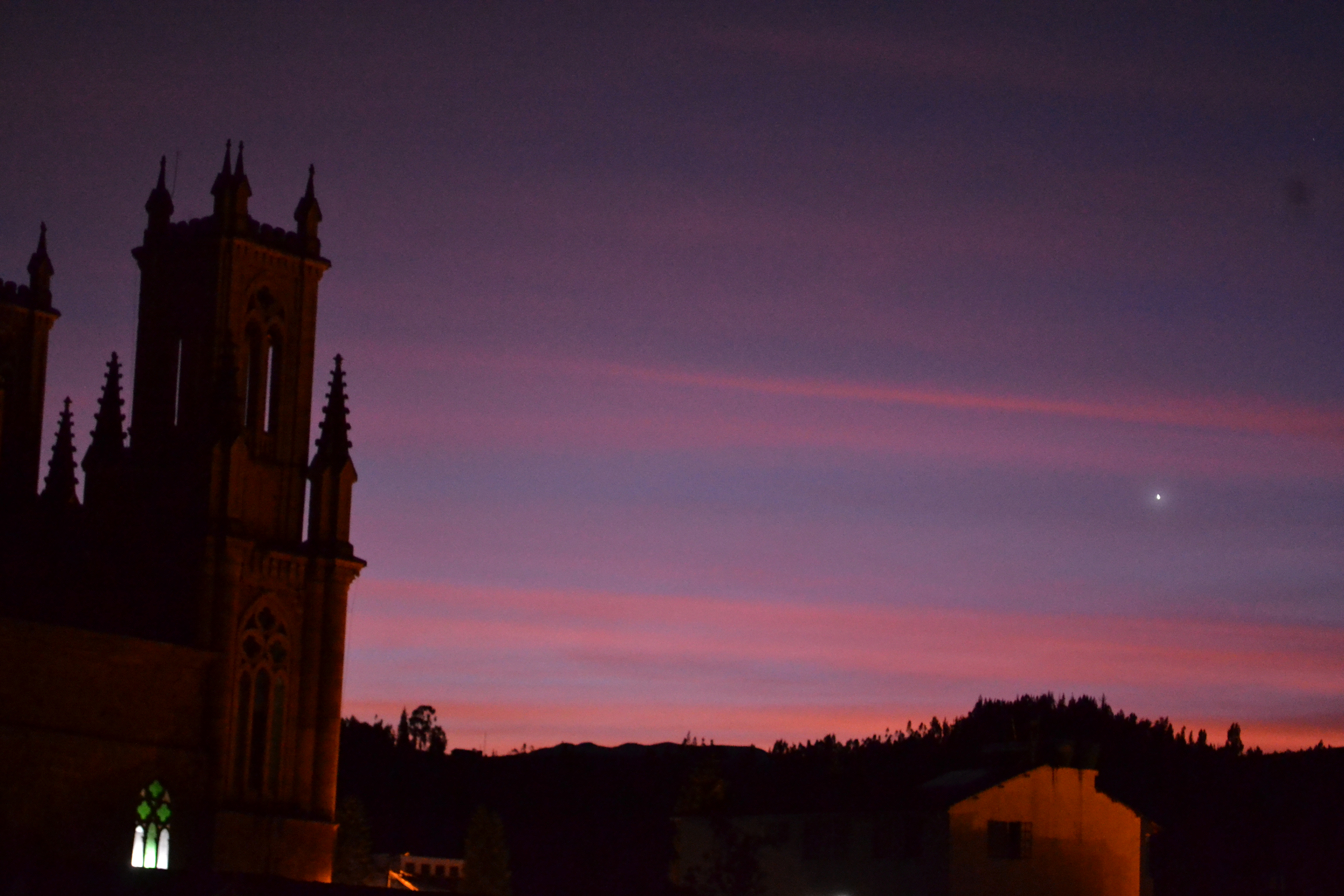 Iglesia Nuestra Señora de las Nieves